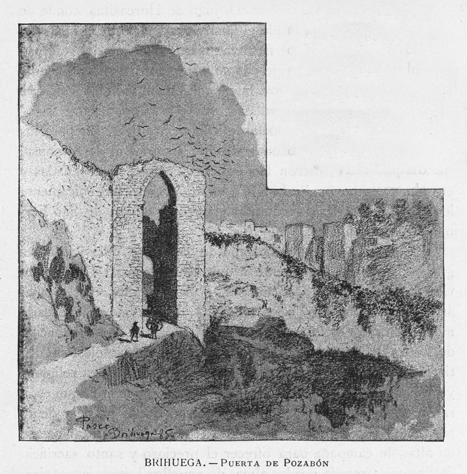 Puerta de Pozabón, en Brihuega.